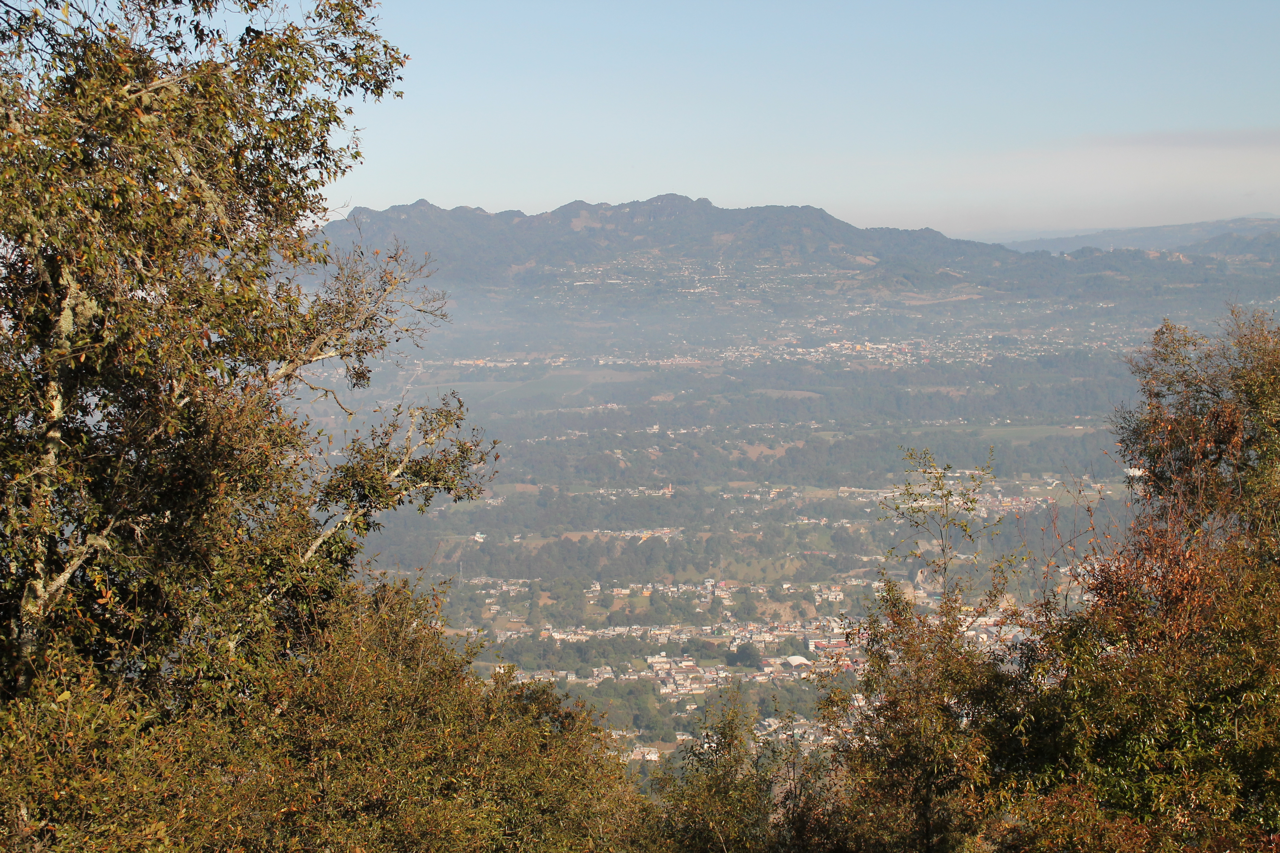 esta es una panorámica de tlatlauquitepec tomada desde el cerro cabezon